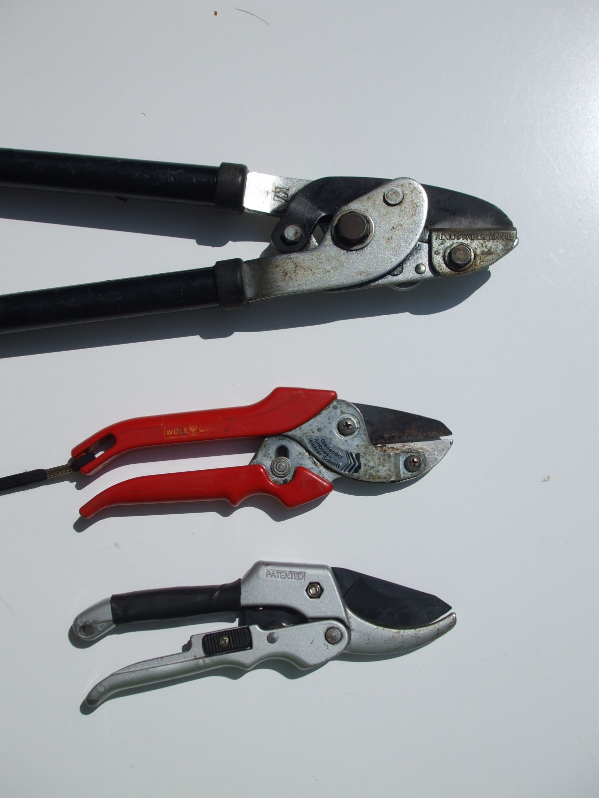 3 Ambosscheren geschlossen, Oben: Astschere, Mitte: gerader Ambos Gartenschere, Unten: gebogener Ambos, Gartenschere